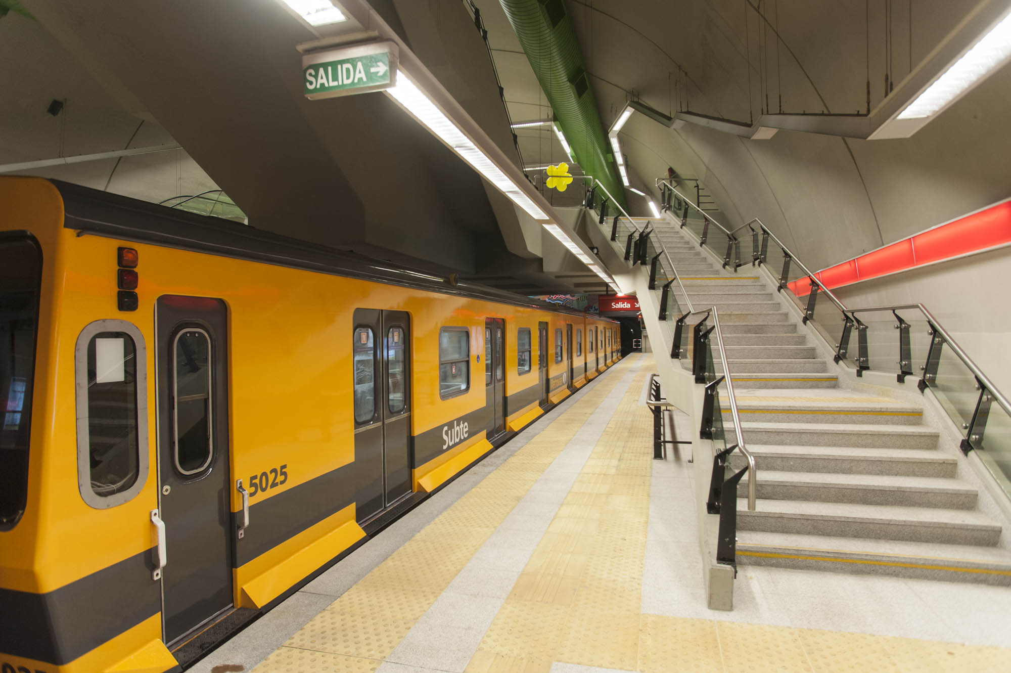 anden y escalera de la Estación Echeverría de la Línea B del Subte de Buenos Aires; día de la inauguración